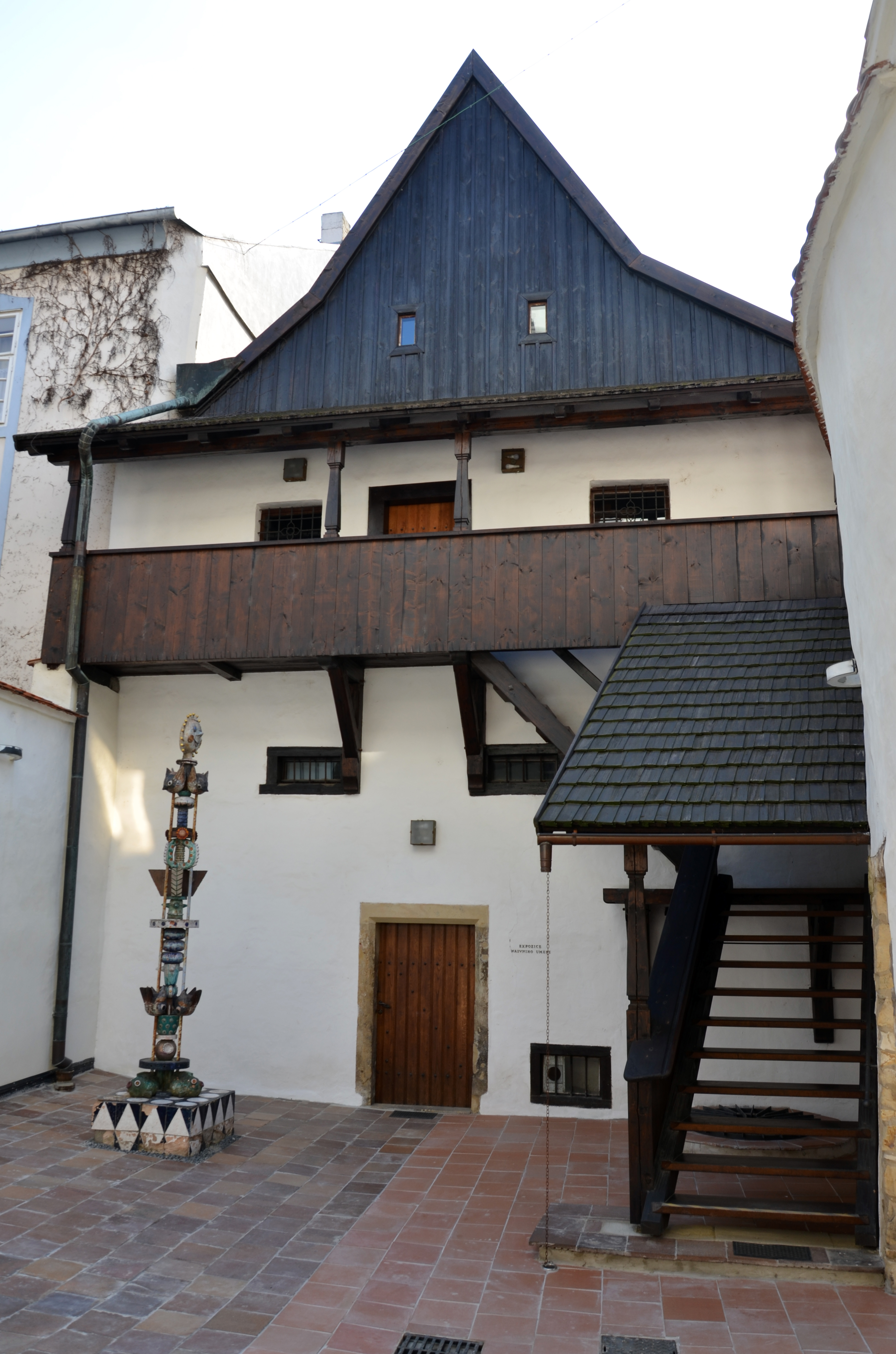 Dvorní stavení č.p. 24, na Mírovém náměstí 17 v Litoměřicích